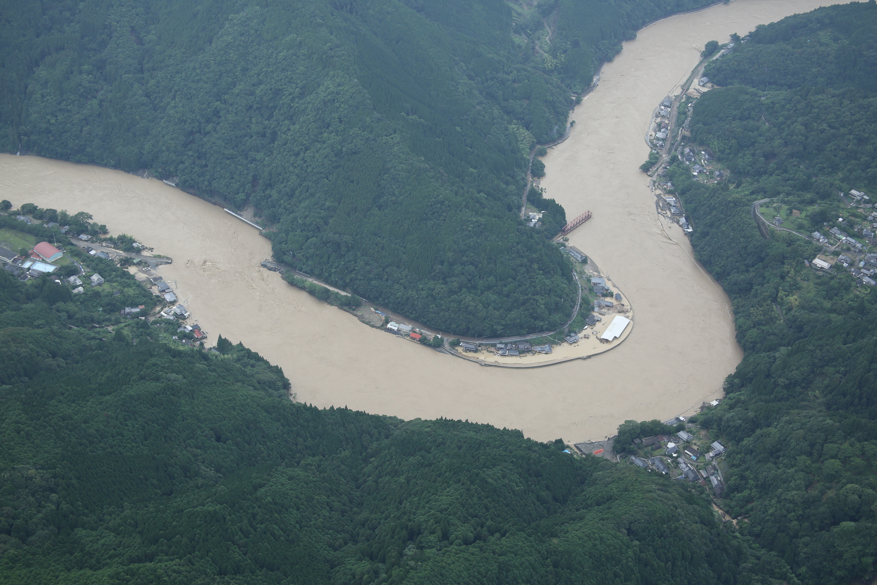 令和2年（2020年）7月3日からの大雨を受けて国土地理院によって行われた現地調査で撮影された空撮写真[1]